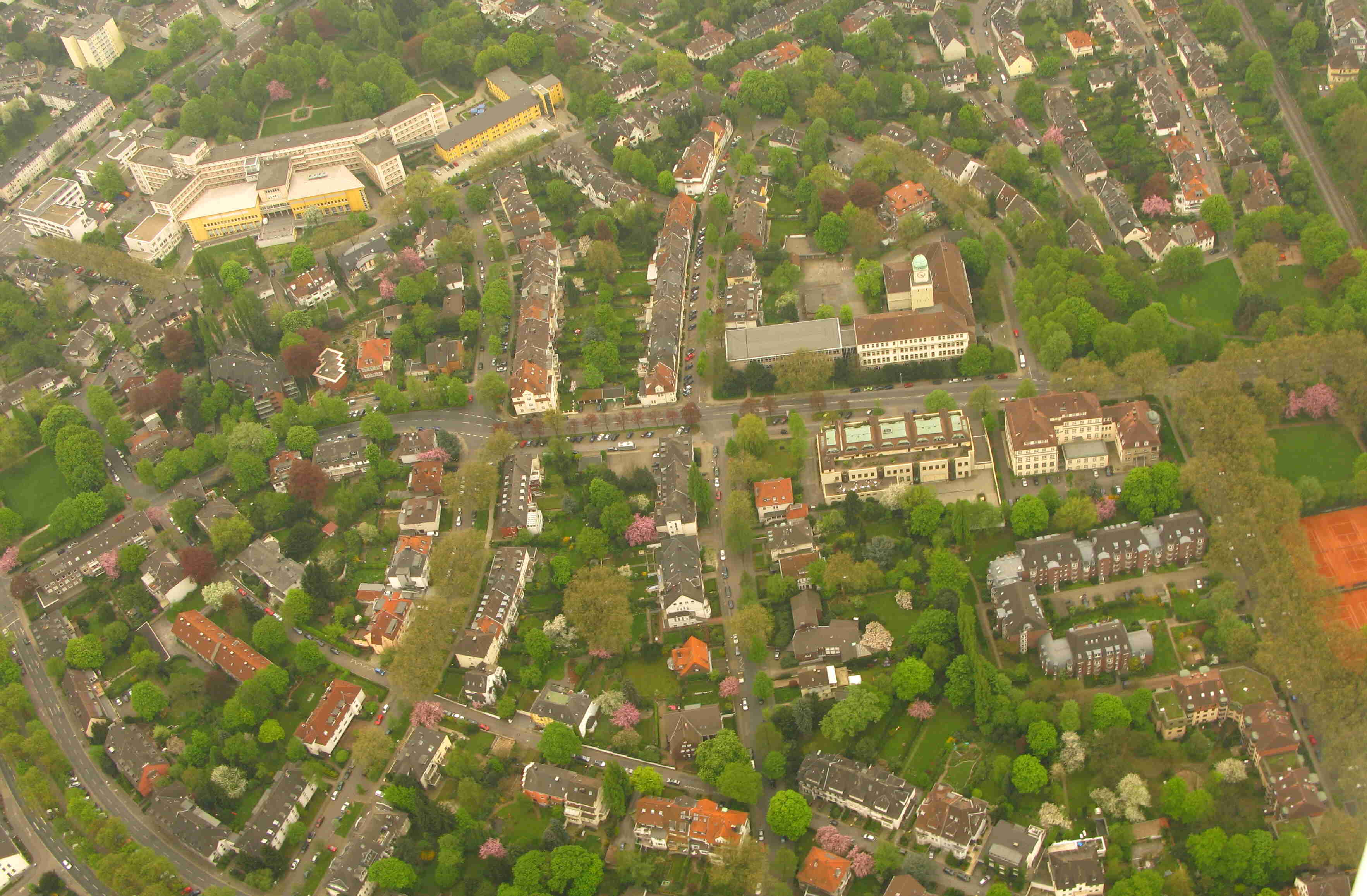 Luftbild Essen Moltkeviertel von Norden